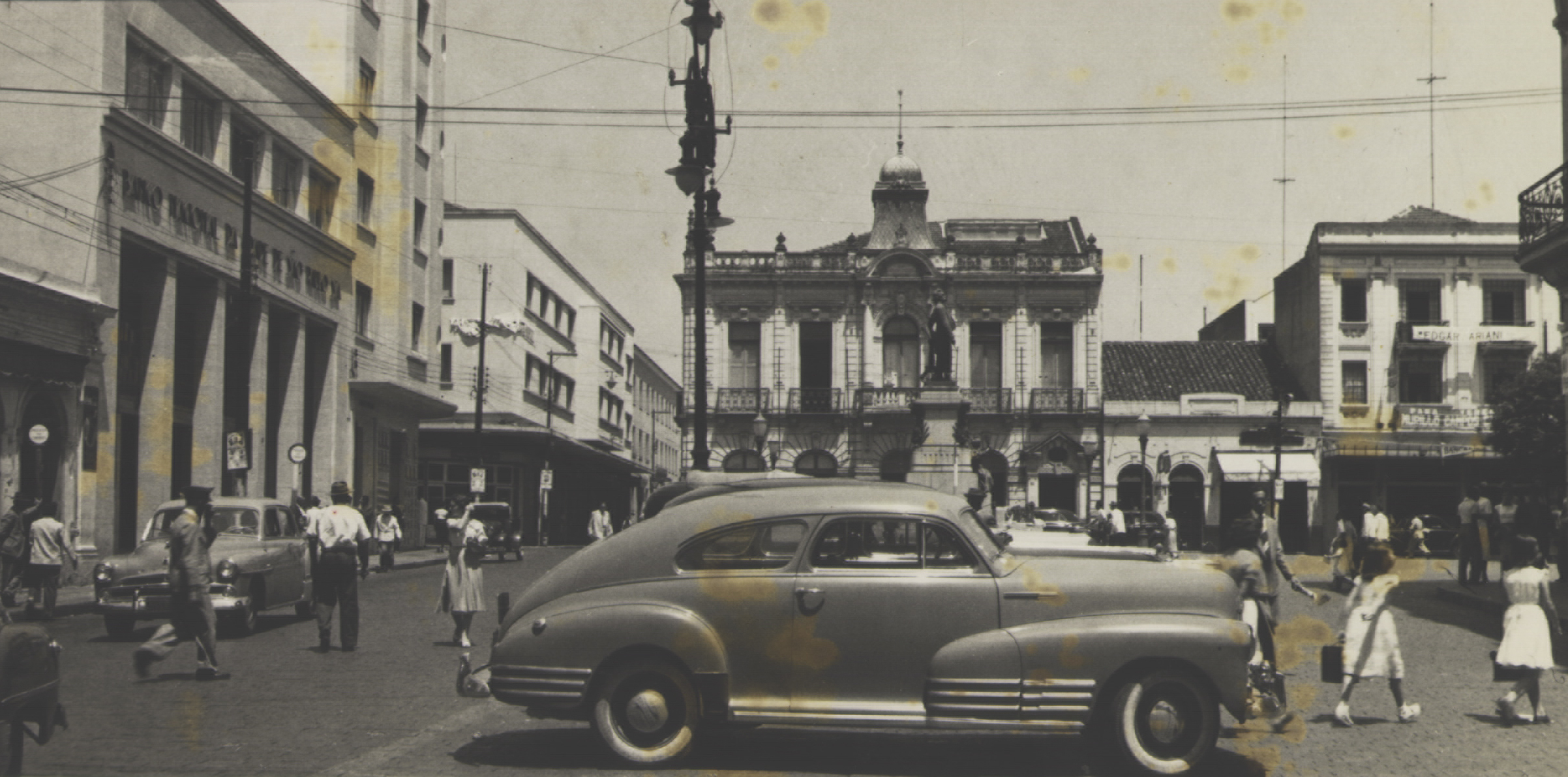 Obra que integra o acervo do Museu Paulista da USP. Coleção Werner Haberkorn